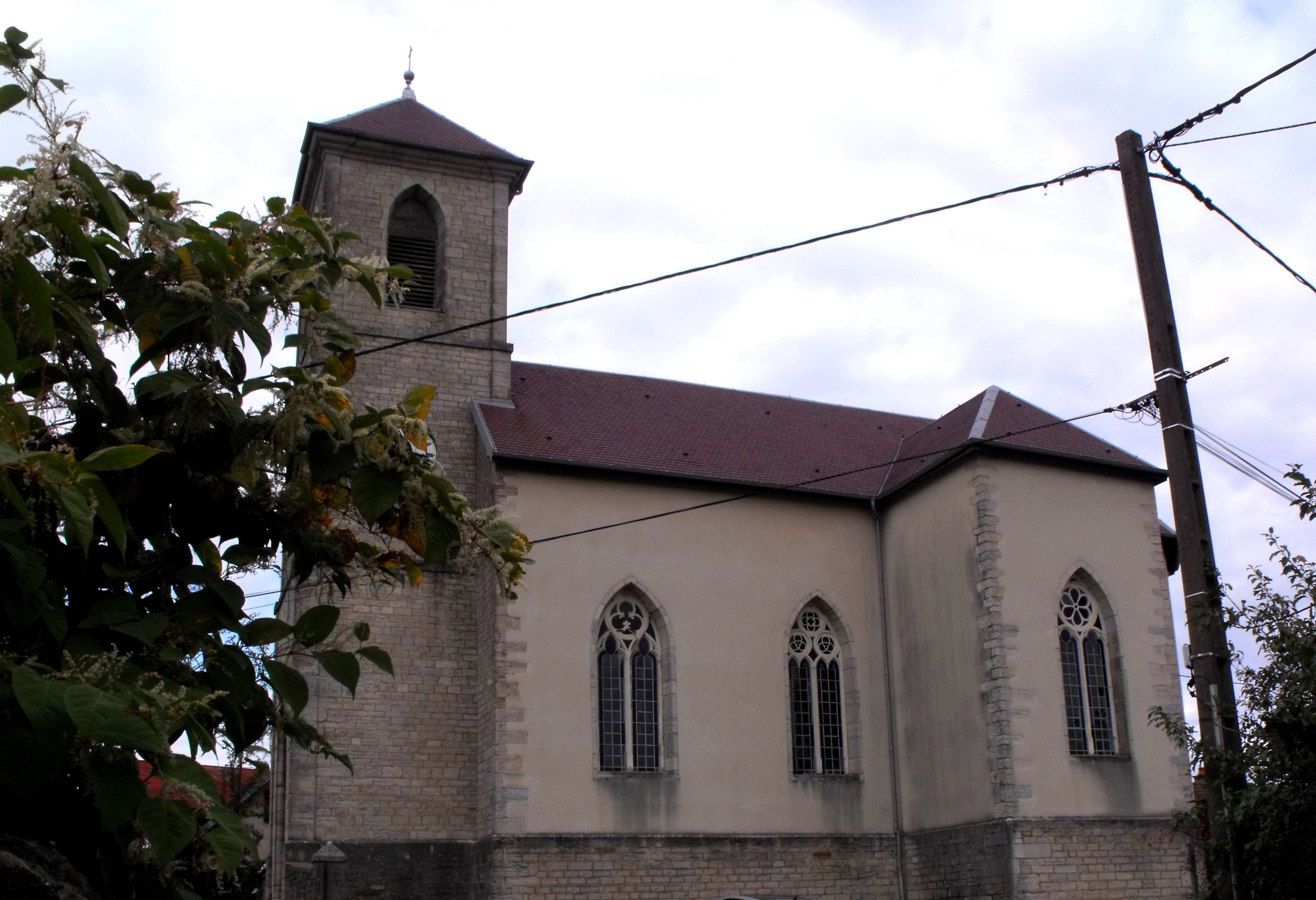 Eglise Saint Germain, Autechaux, Doubs, France